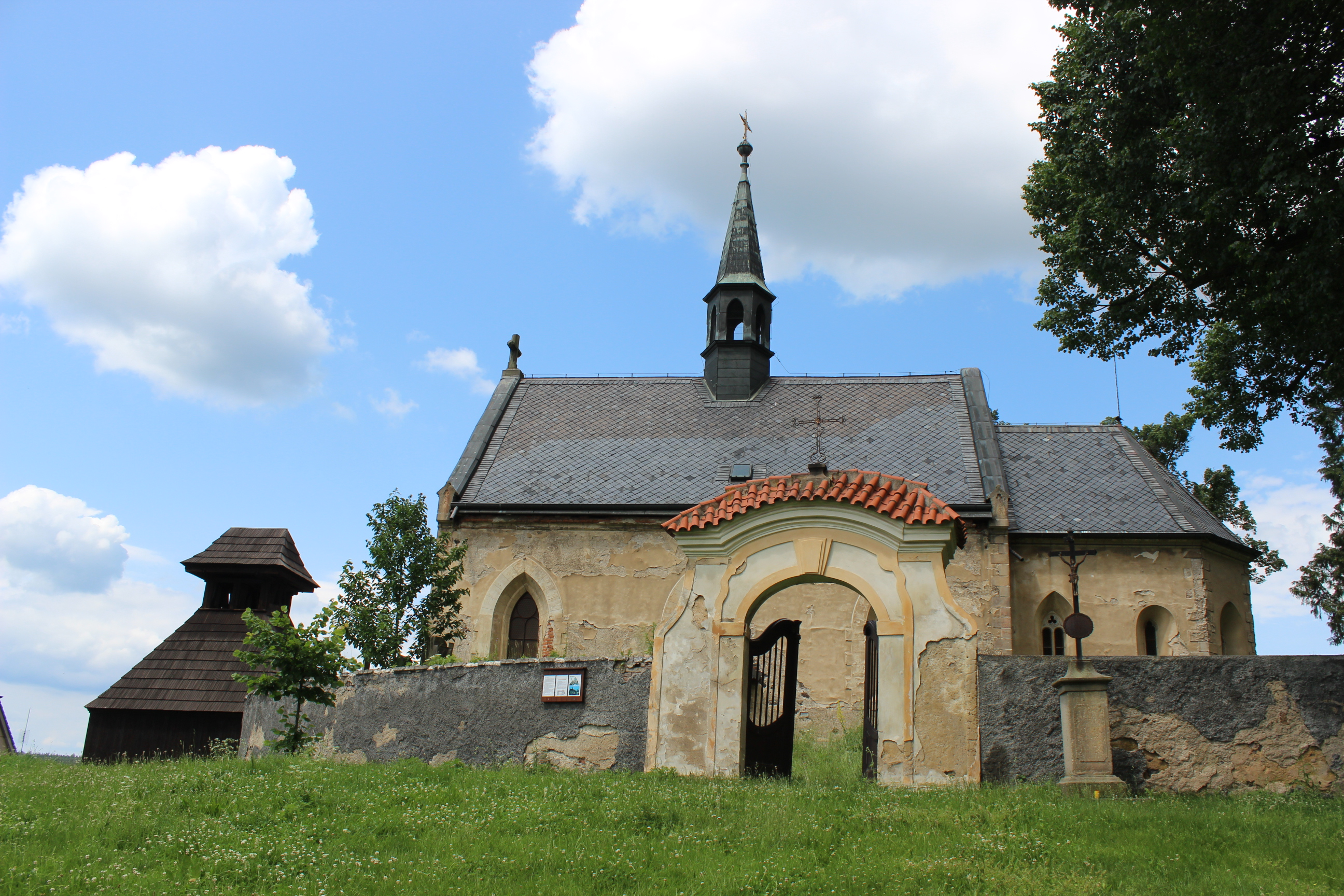 Kostel svatého Mikuláše v Bělči v kladenském okrese (pohled od jihovýchodu).